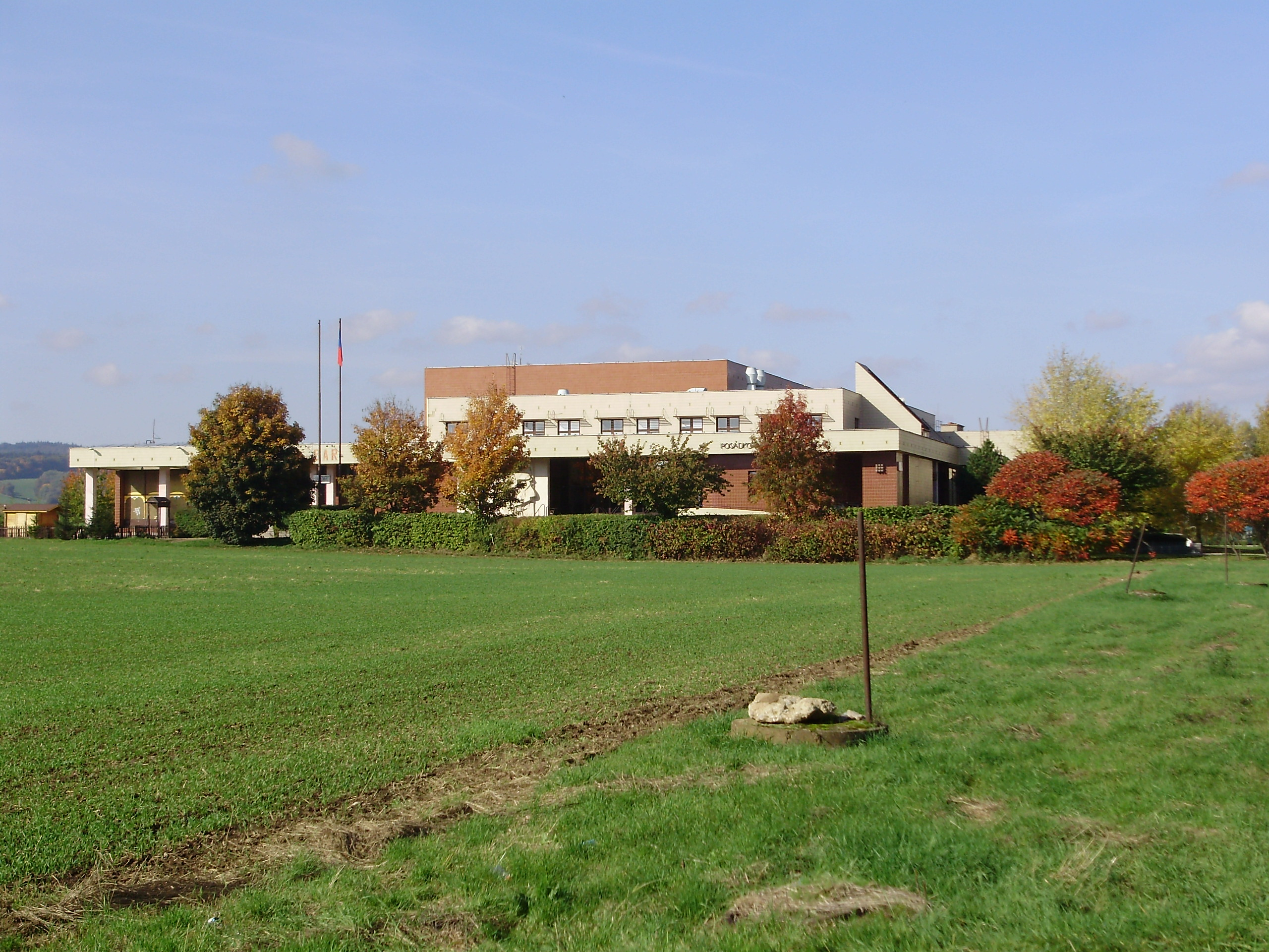 Posádkový dům armády Dědice Vyškov